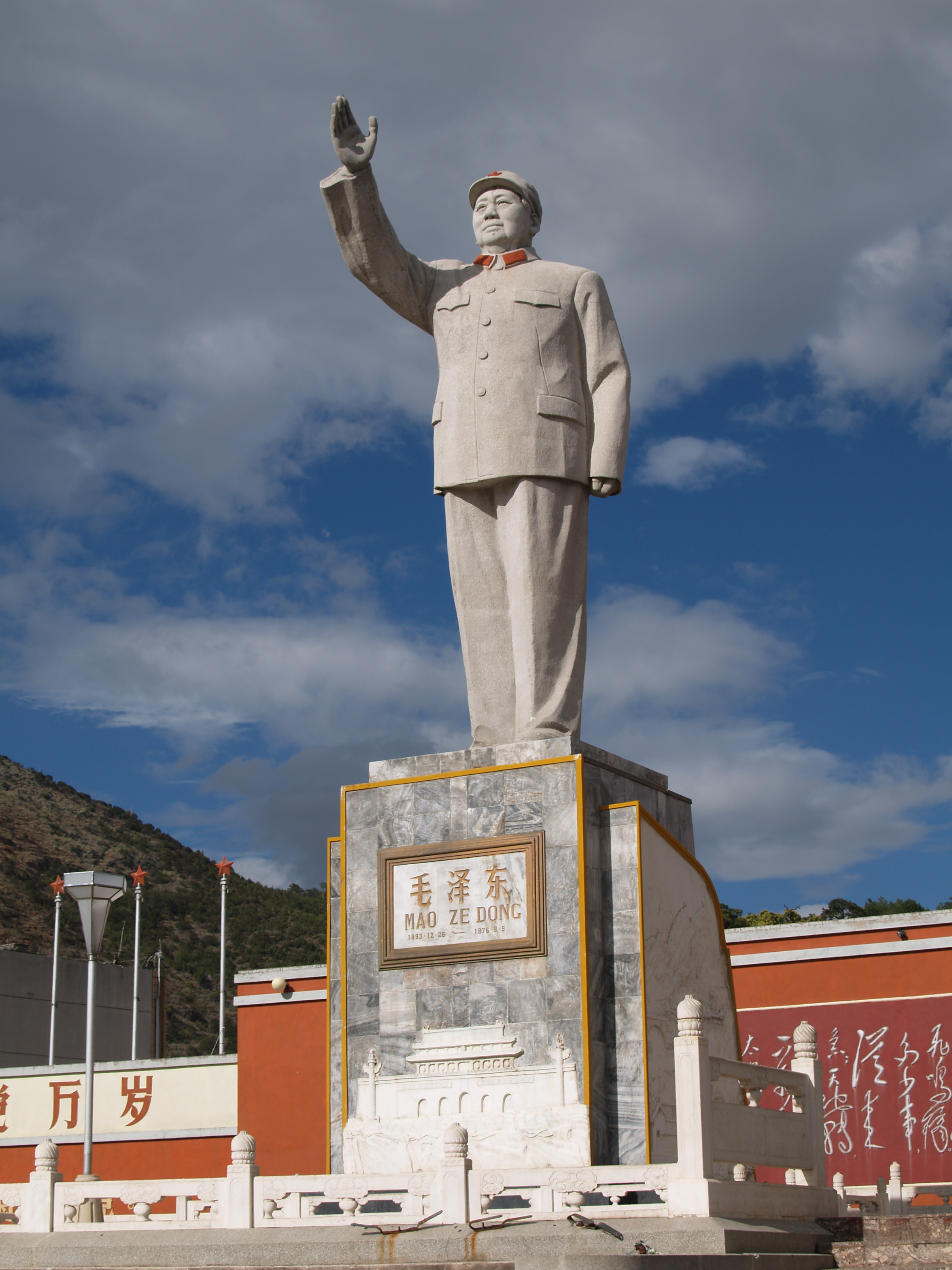 Mao Statue in Lijang